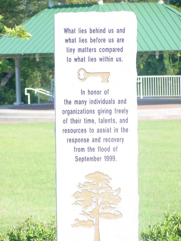 Plaque commémorant les inondations de la ville de Franklin en 1999.